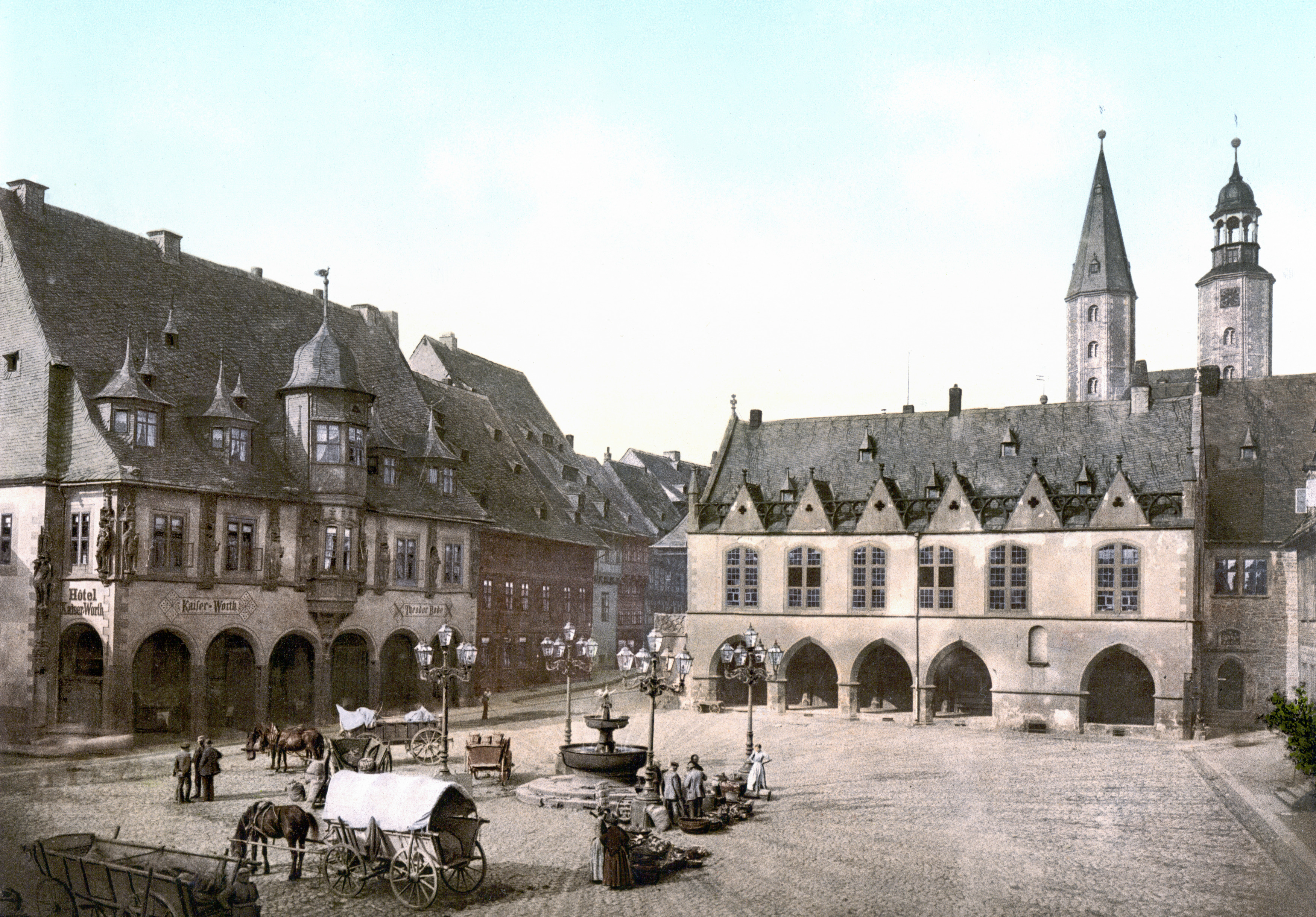 Goslar. Hotel Kaiserworth und Rathaus.